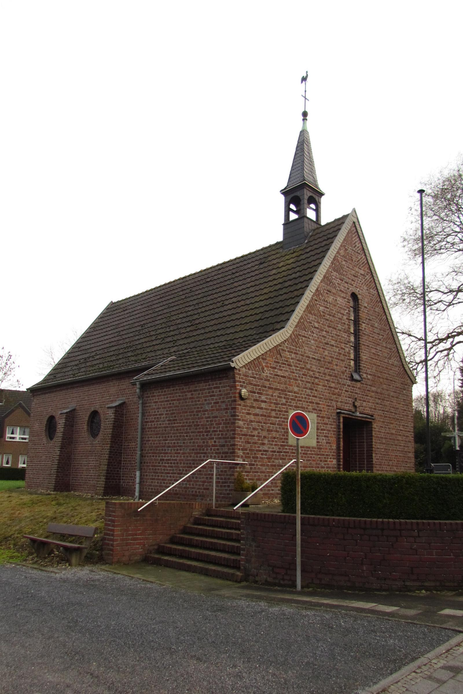 Kirchen, Kapellen in Heinsberg